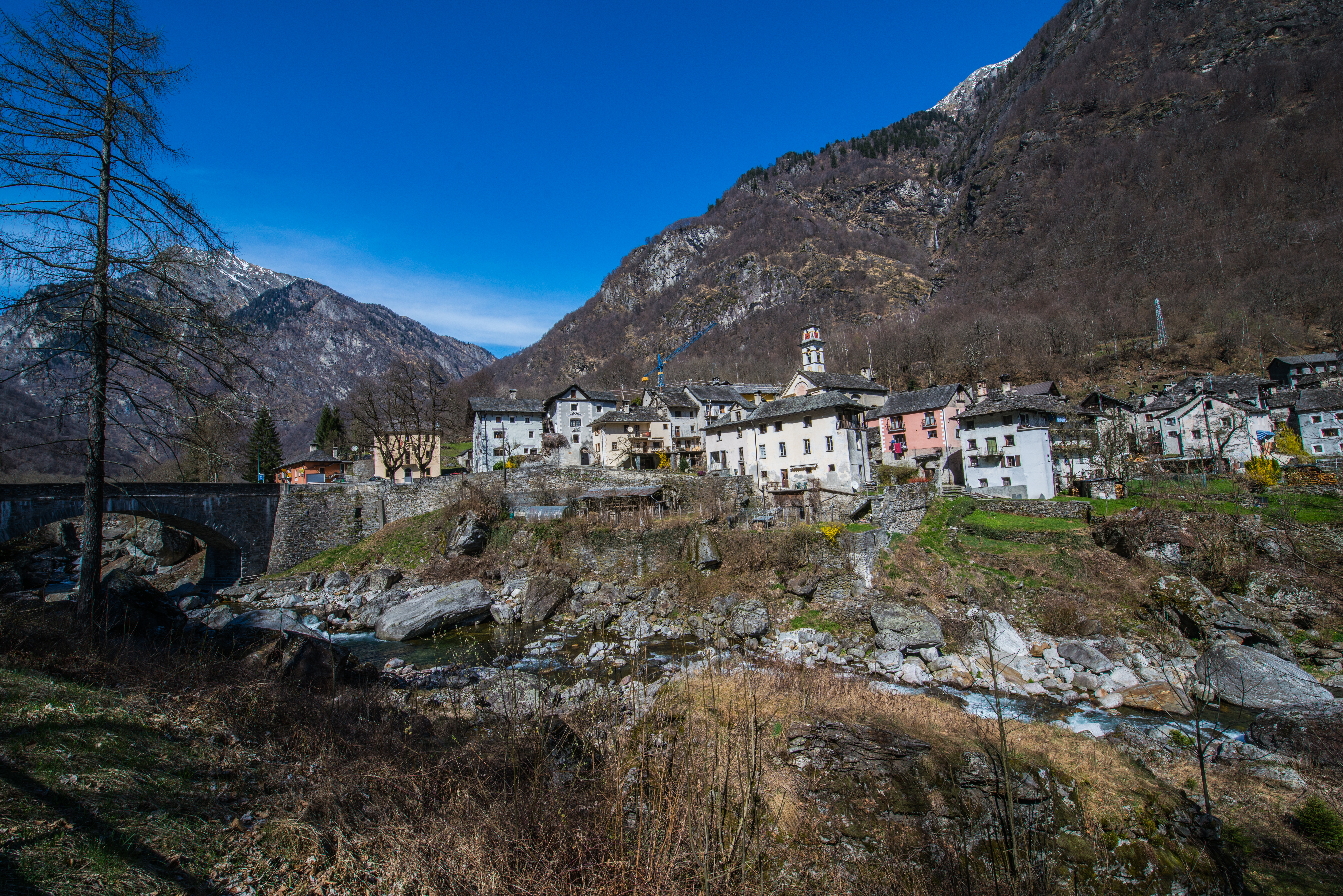 Prato-Sornico mit Sornico ist eine Fraktion der politischen Gemeinde Lavizzara im Kreis Lavizzara, im Bezirk Vallemaggia des Kantons Tessin in der Schweiz.